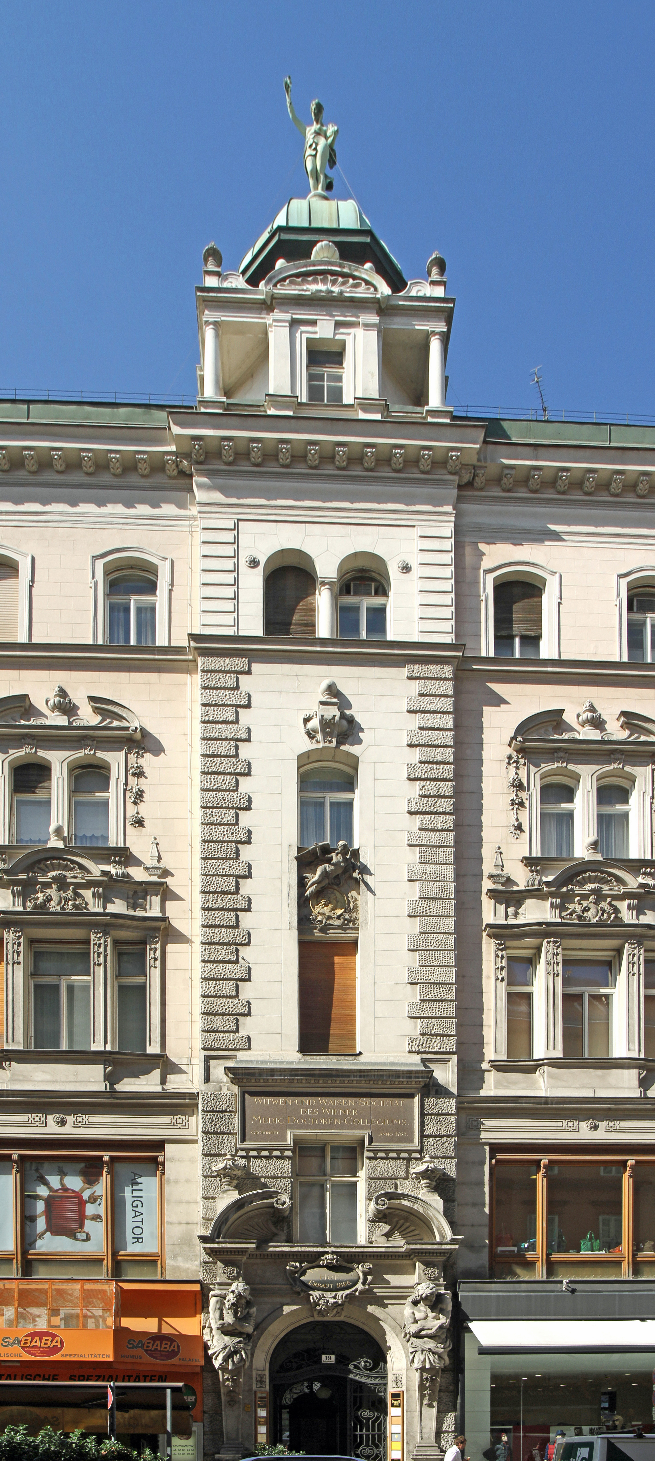 Stiftungshaus Van-Swieten-Hof